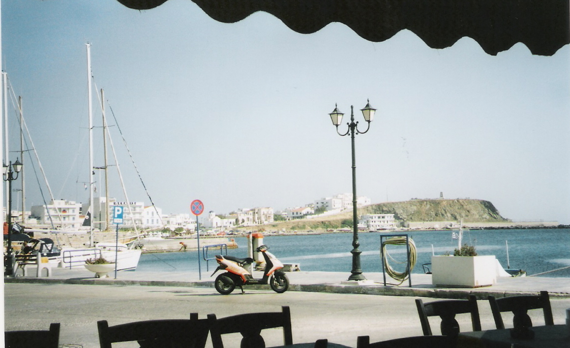 Der Yacht- und Boots-hafen von Tinos.